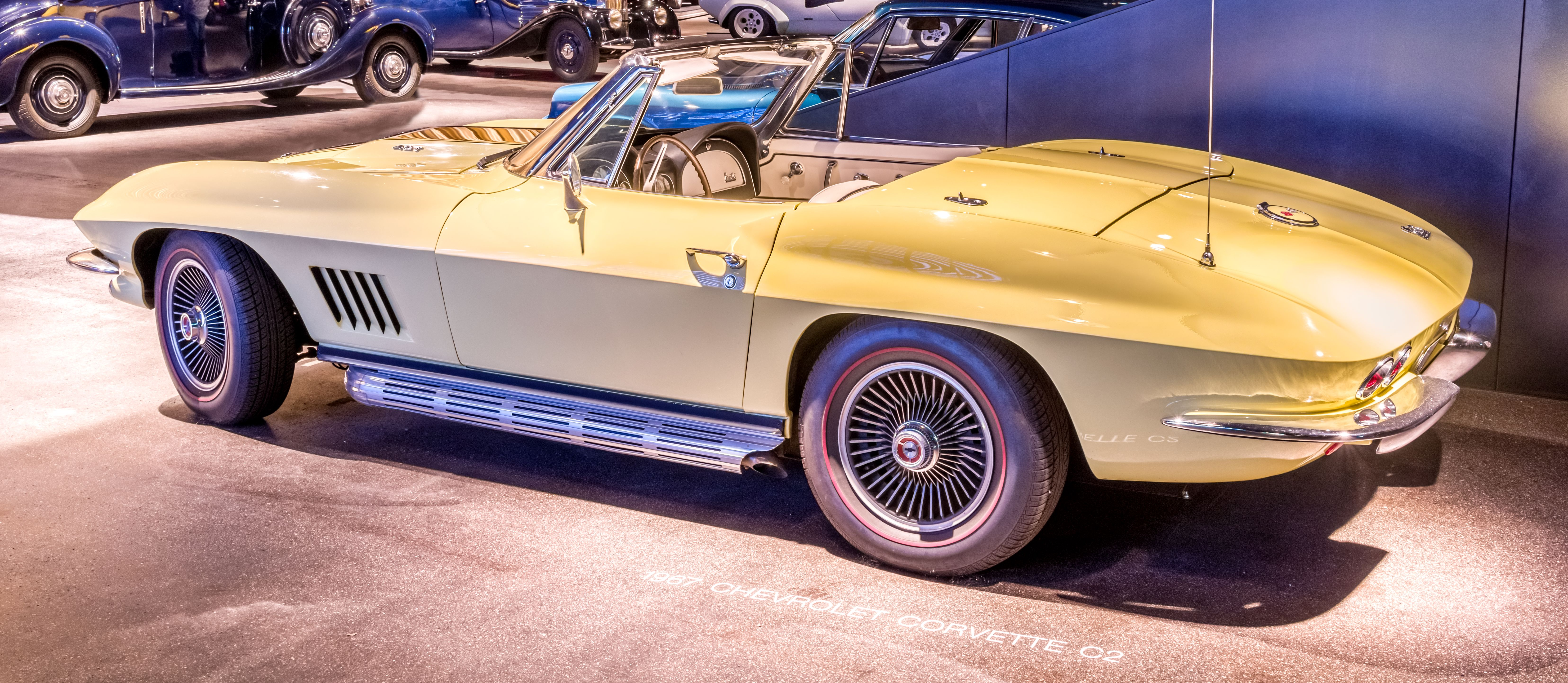 Das Volante Oldtimermuseum in Kirchzarten